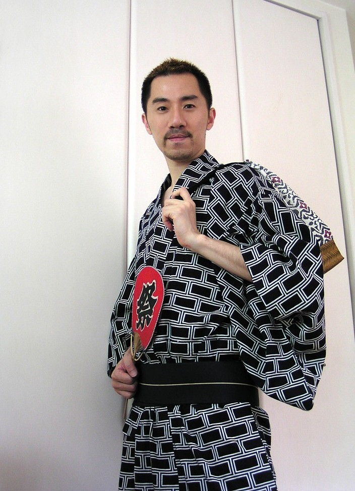 中文（台灣）: 旅居日本的黃士祐